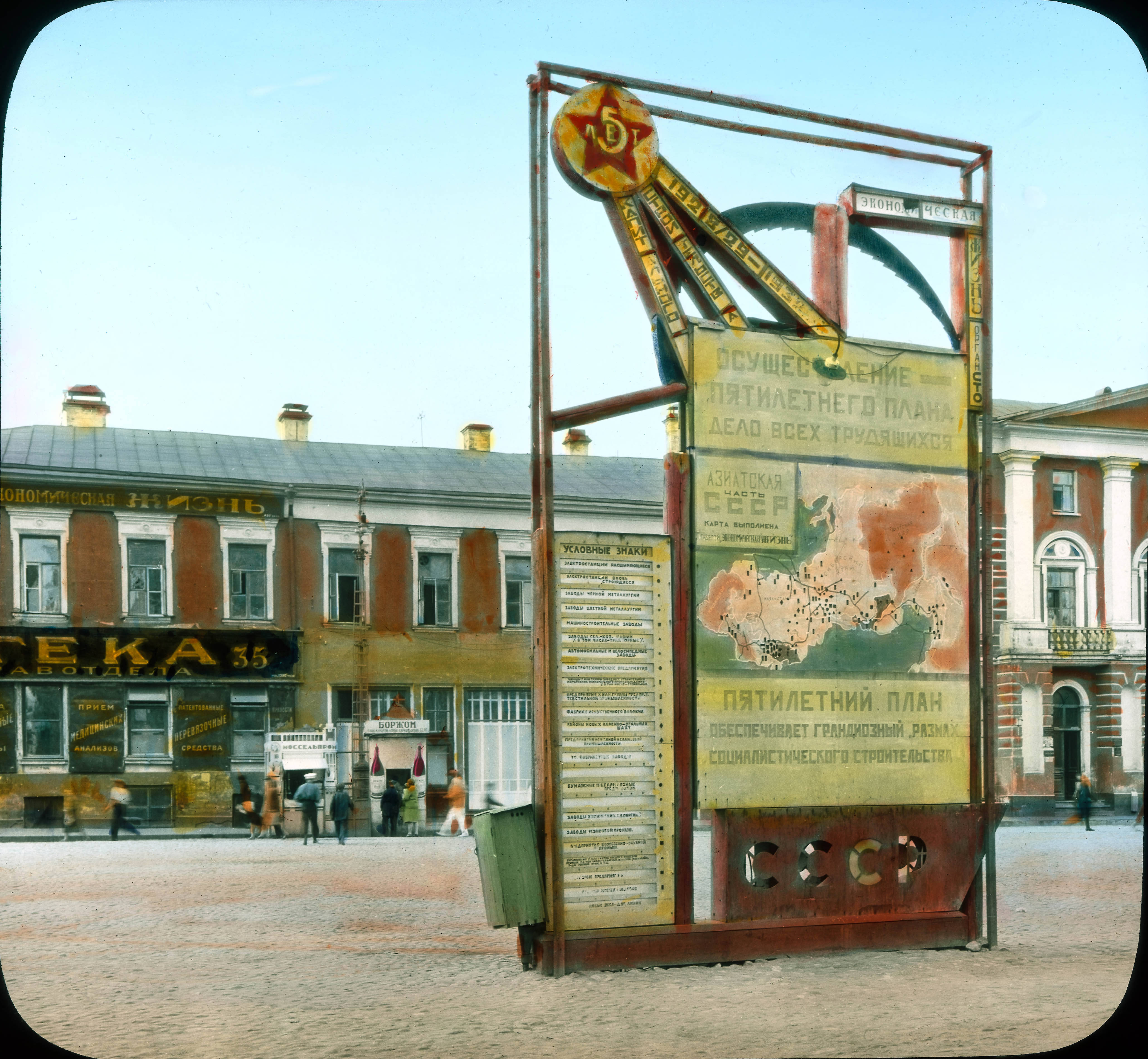 Агитация на Советской площади